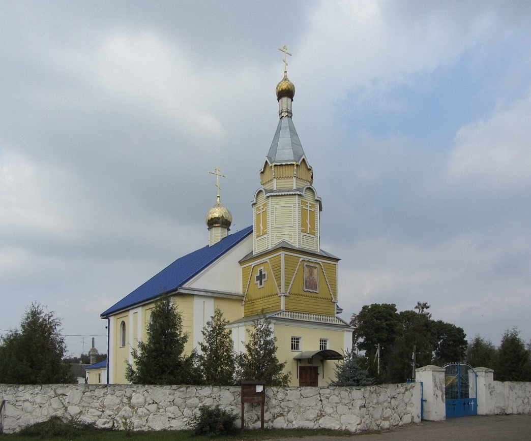 Краявіды Воўчына